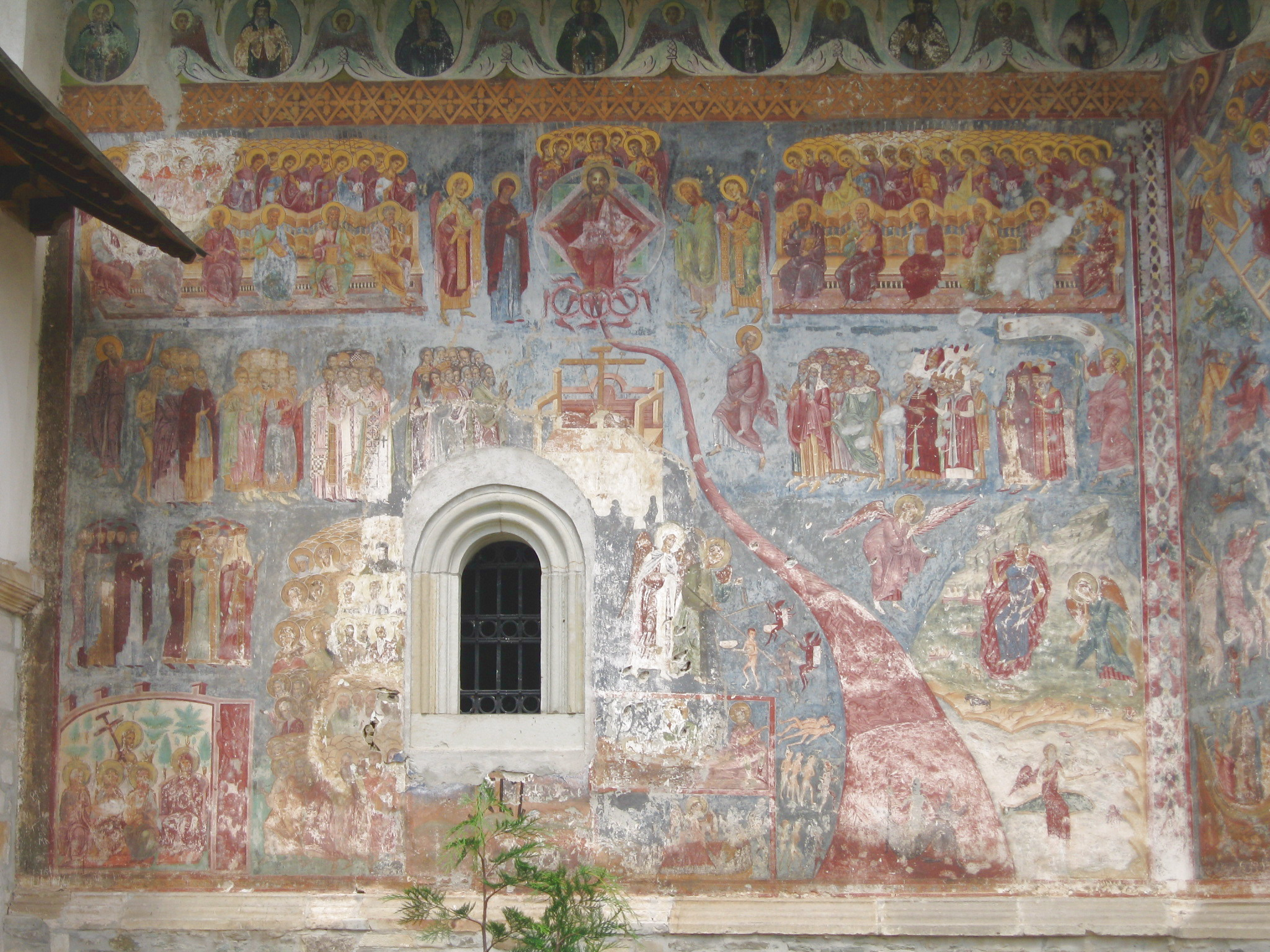 Mănăstirea Râşca